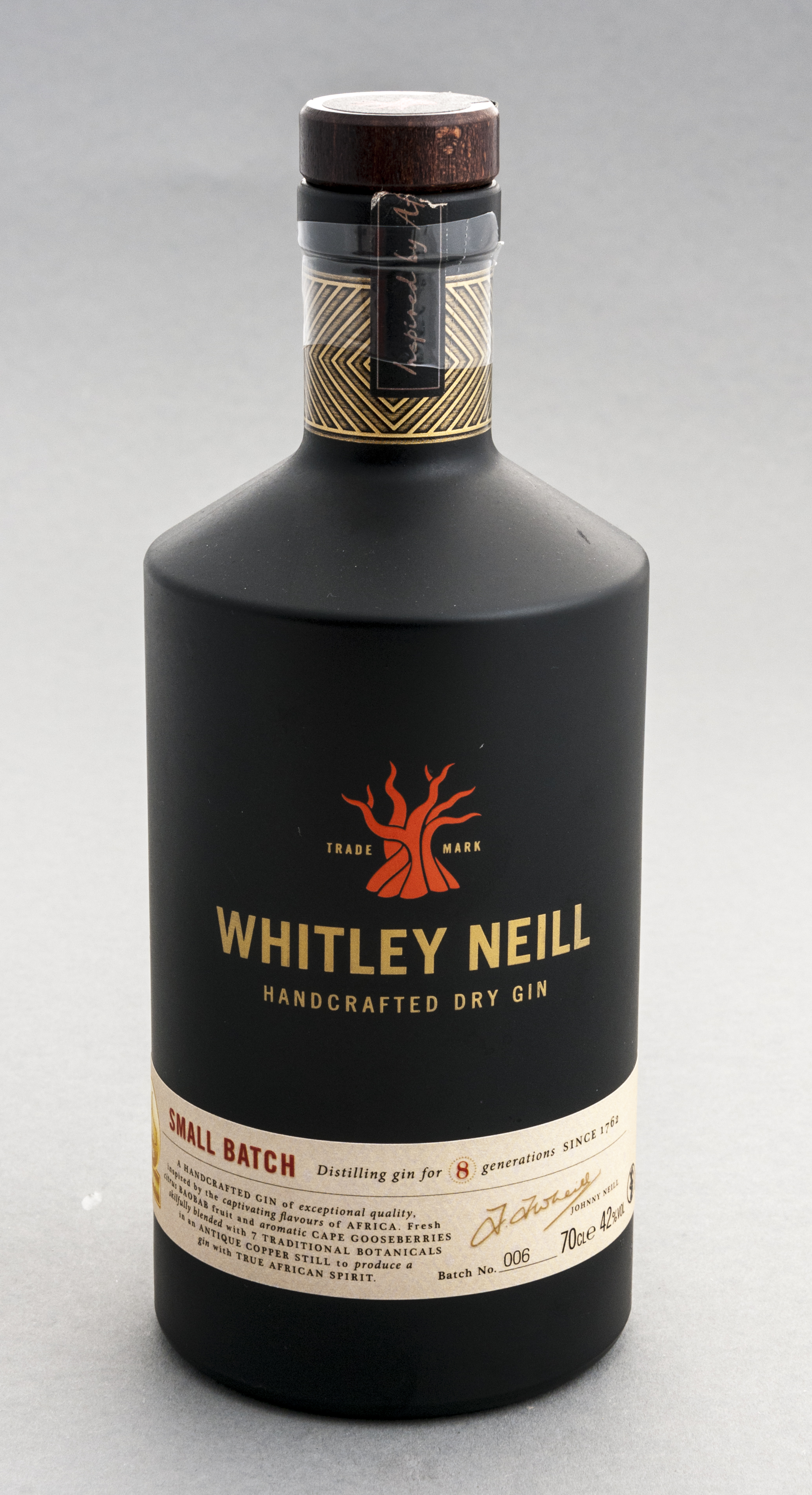 Flasche